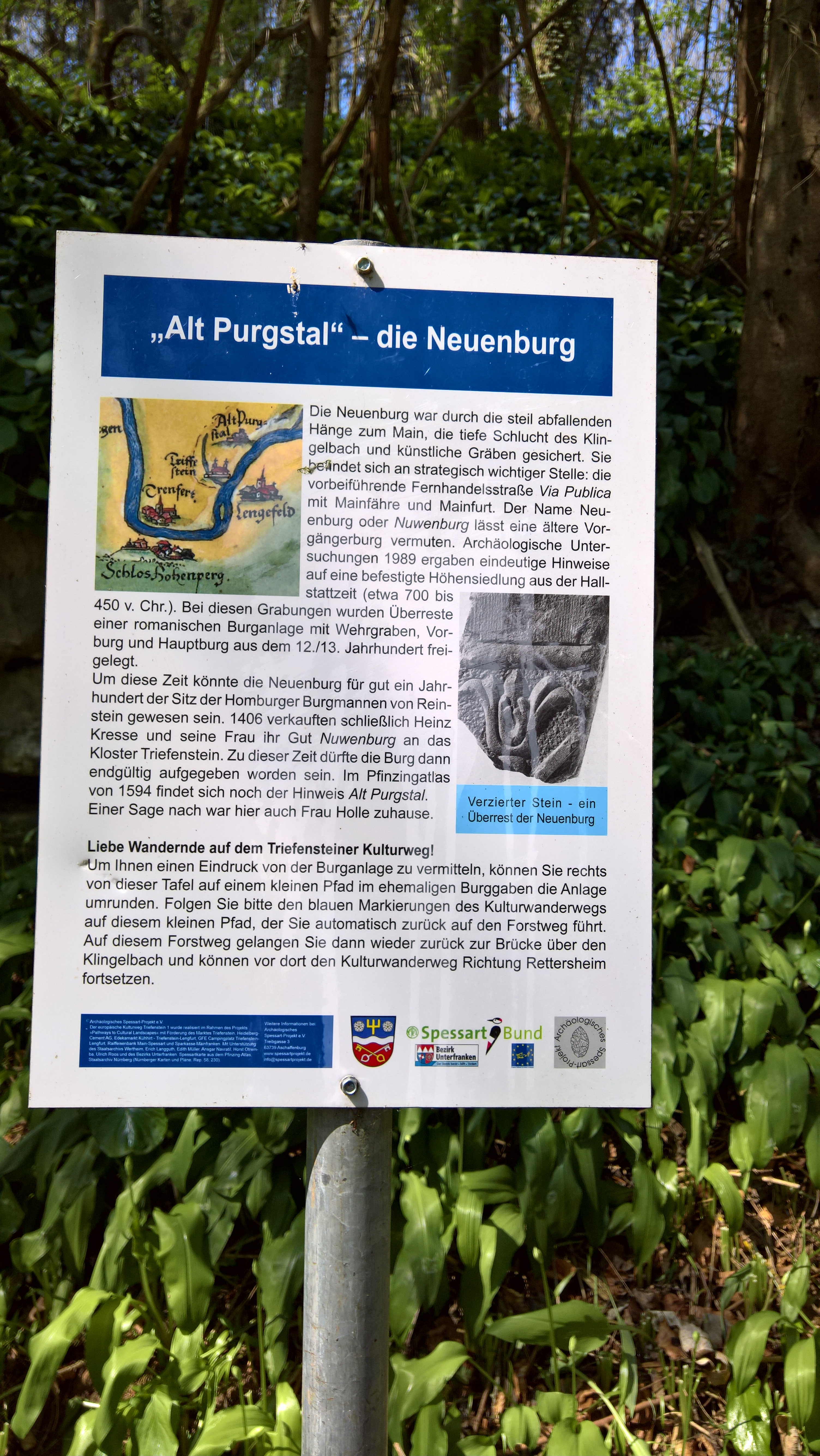 Informationstafel des Triefensteiner Kulturweges zur Burg. Dahinter die Hauptburg.